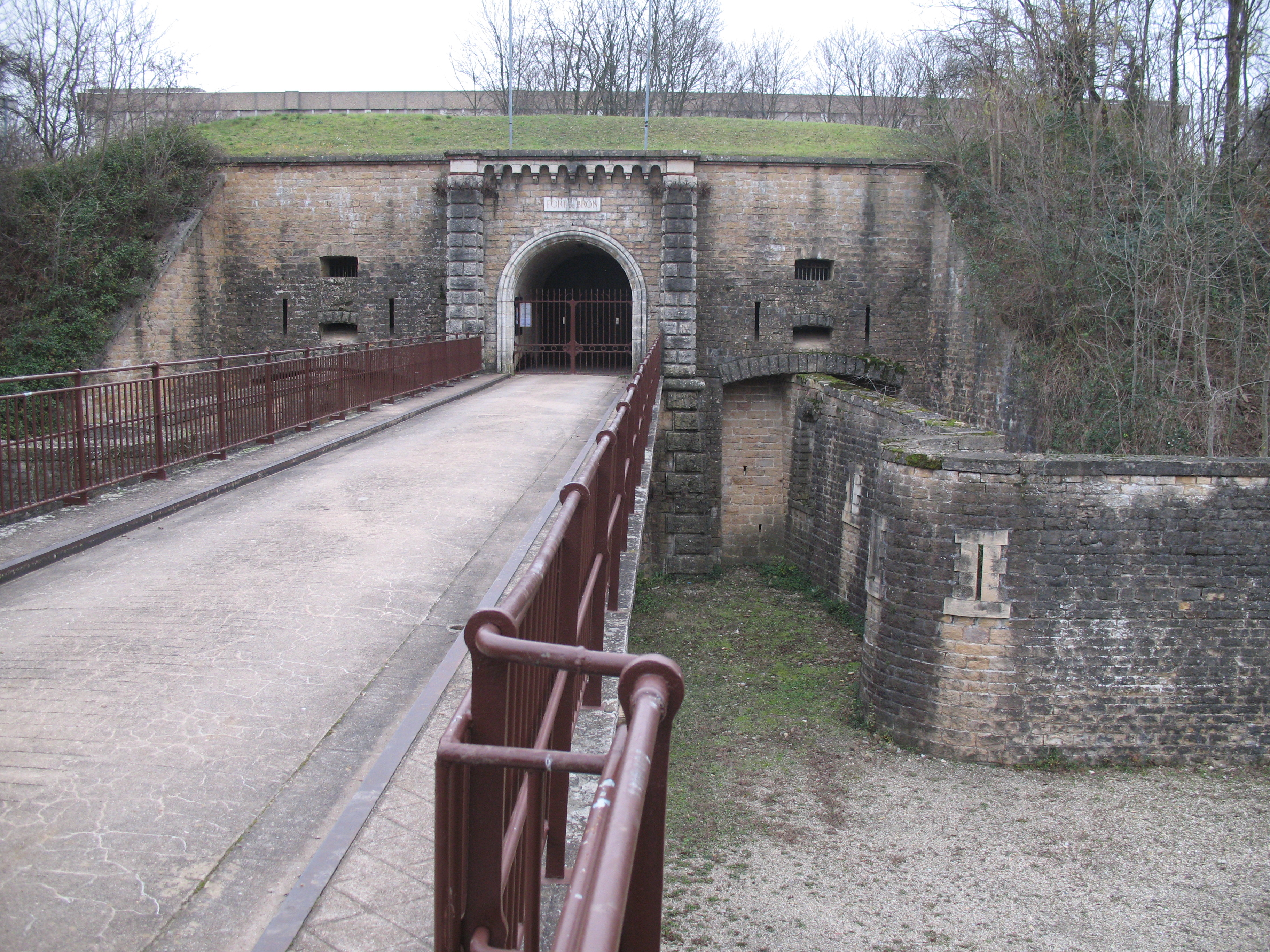 Entrée principale du fort de Bron dans le Rhône.